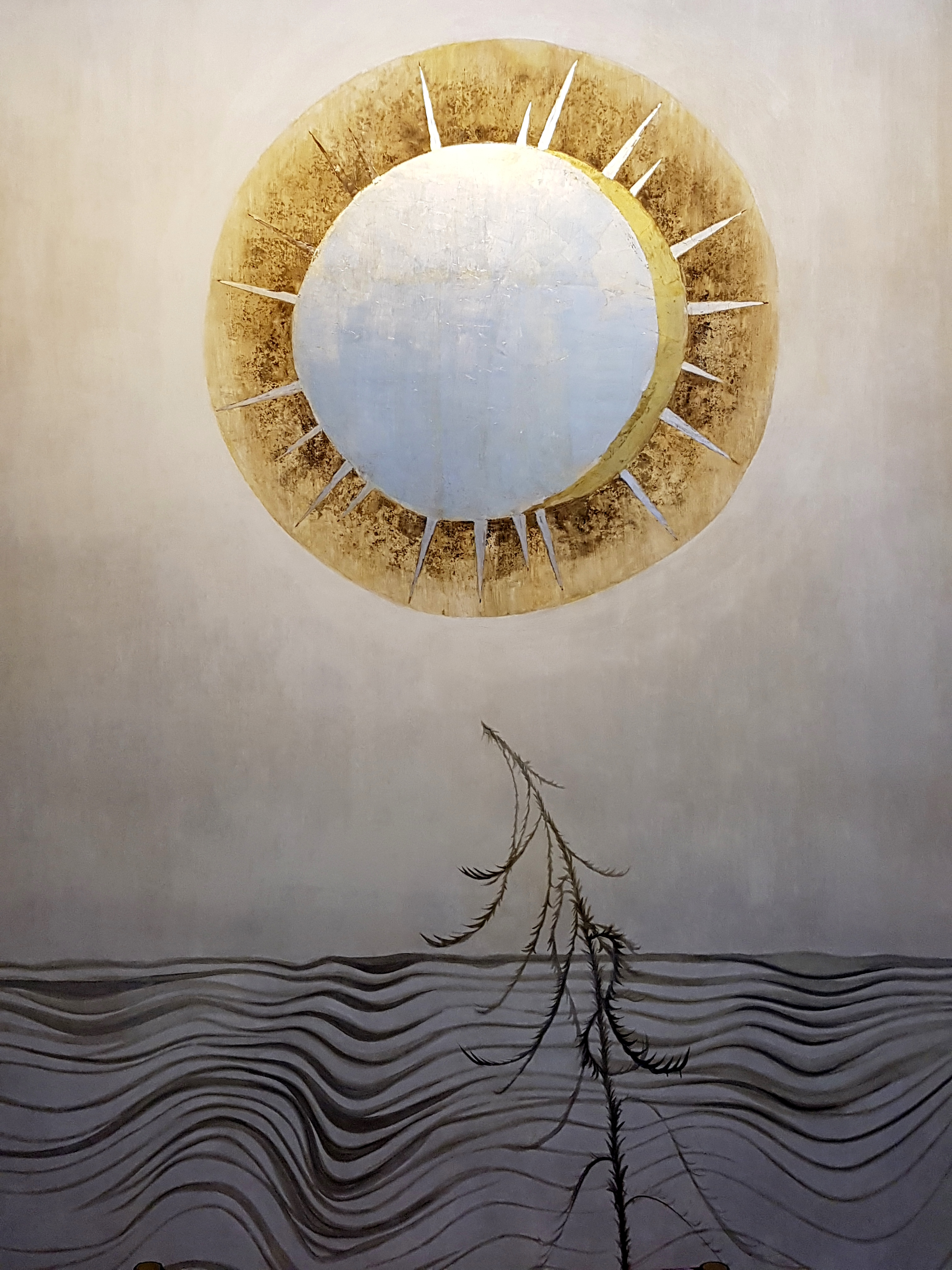 Luna, mural de Nemesio Antúnez en en el descanso de las escaleras que daban al teatro y cine Gran Palace ( calle Huérfanos casi al llegar a Morandé) en Santiago de Chile); foto de diciembre de 2017